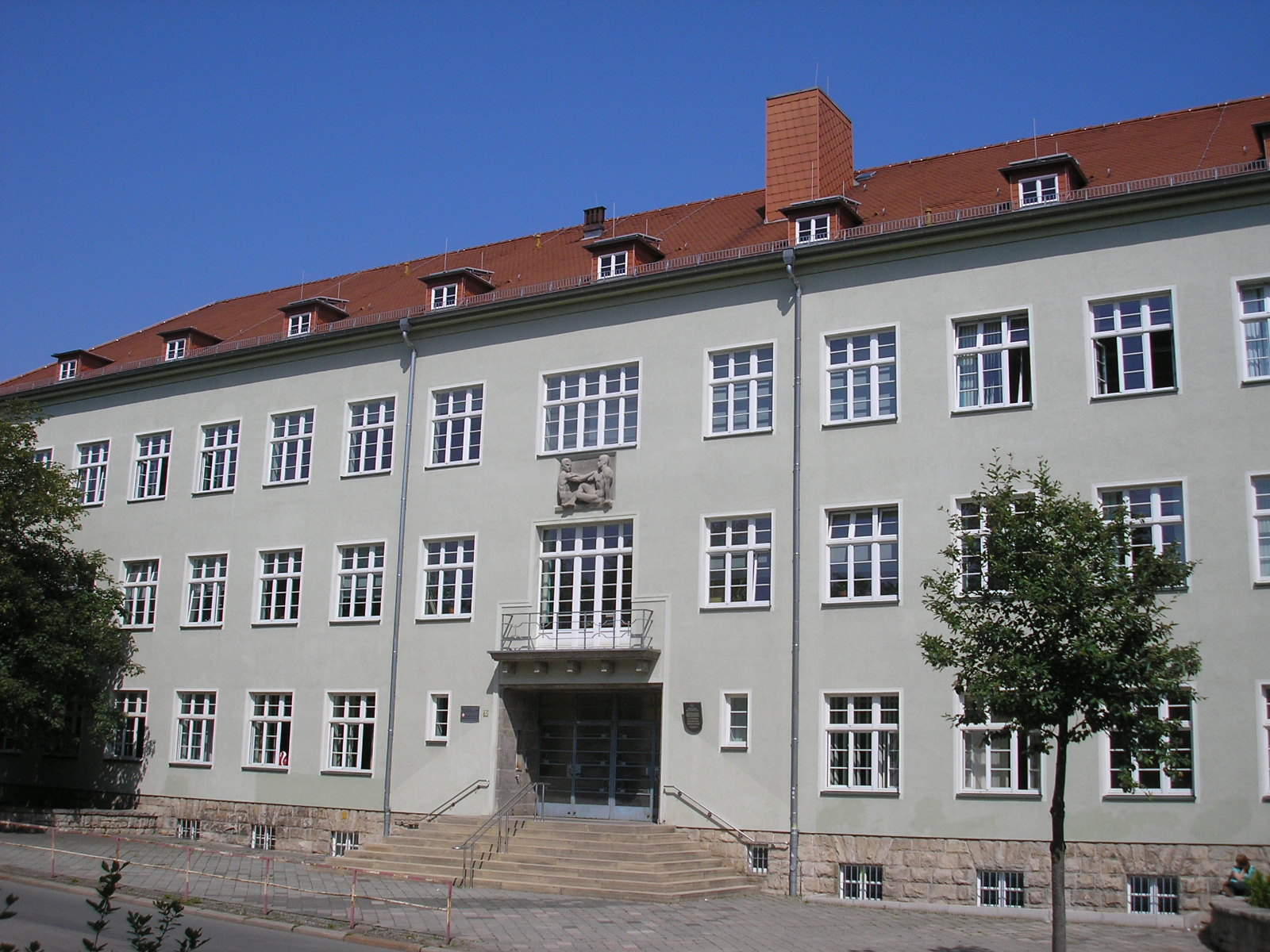 Das Heinrich-Mann-Gymnasium in Erfurt.